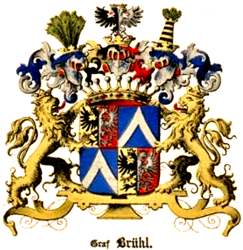 Wappen der Grafen von Brühl